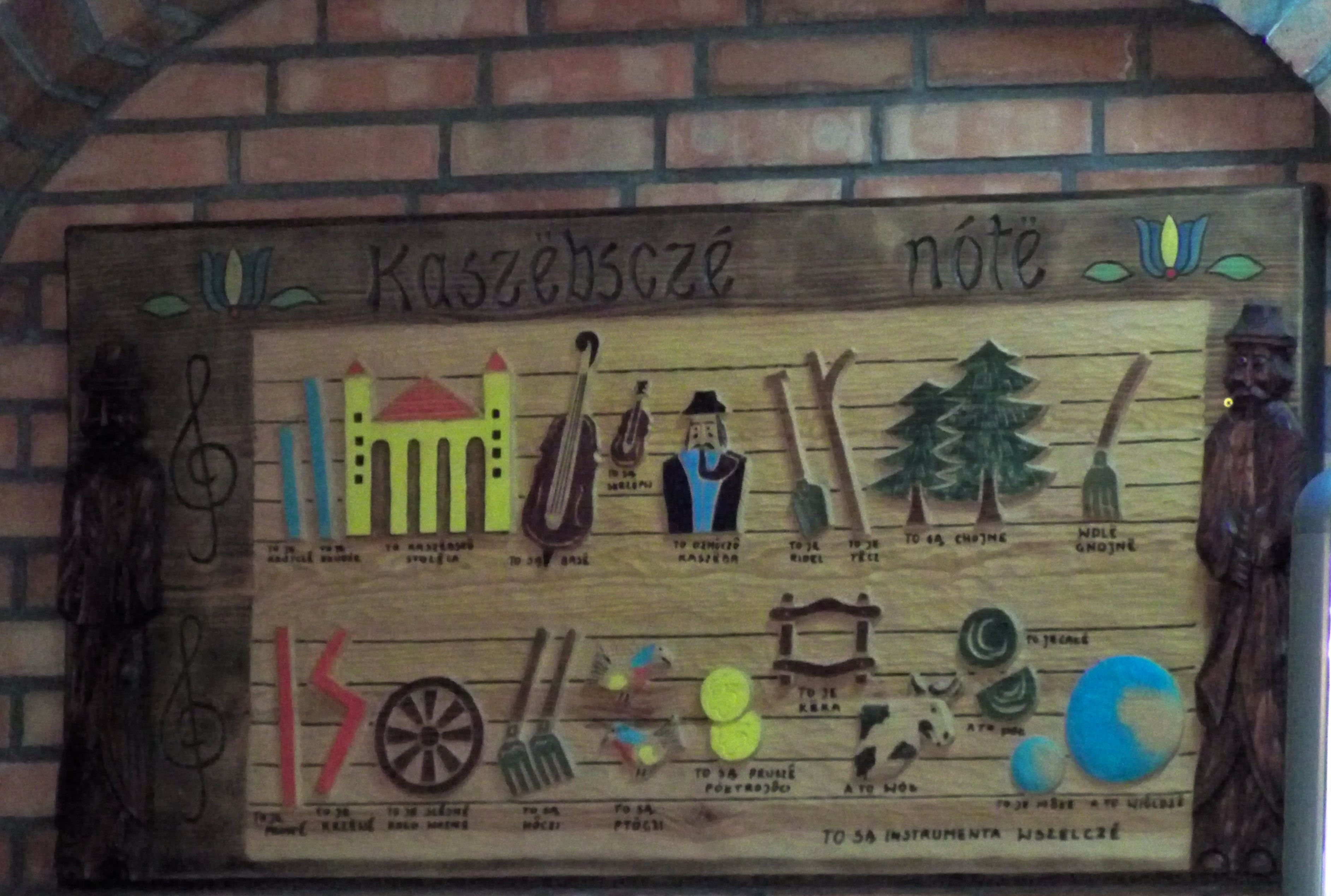 Drewniana płaskorzeźba z "Kaszubskimi nutami". Restauracja w CEPR w Szymbarku.